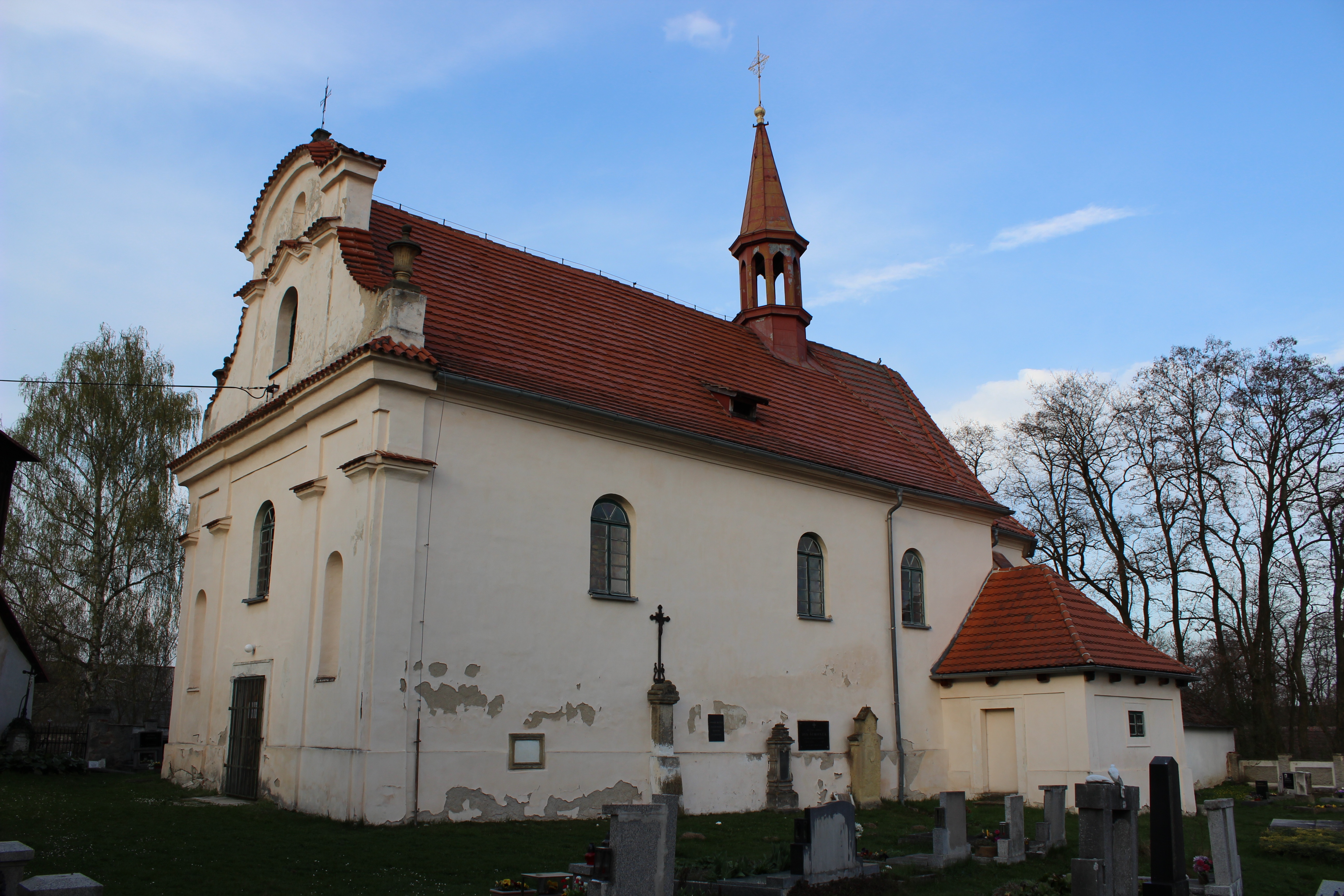 Kostel svatého Jakuba Většího v Kadlíně. This photograph was taken with a Canon EOS 600D.